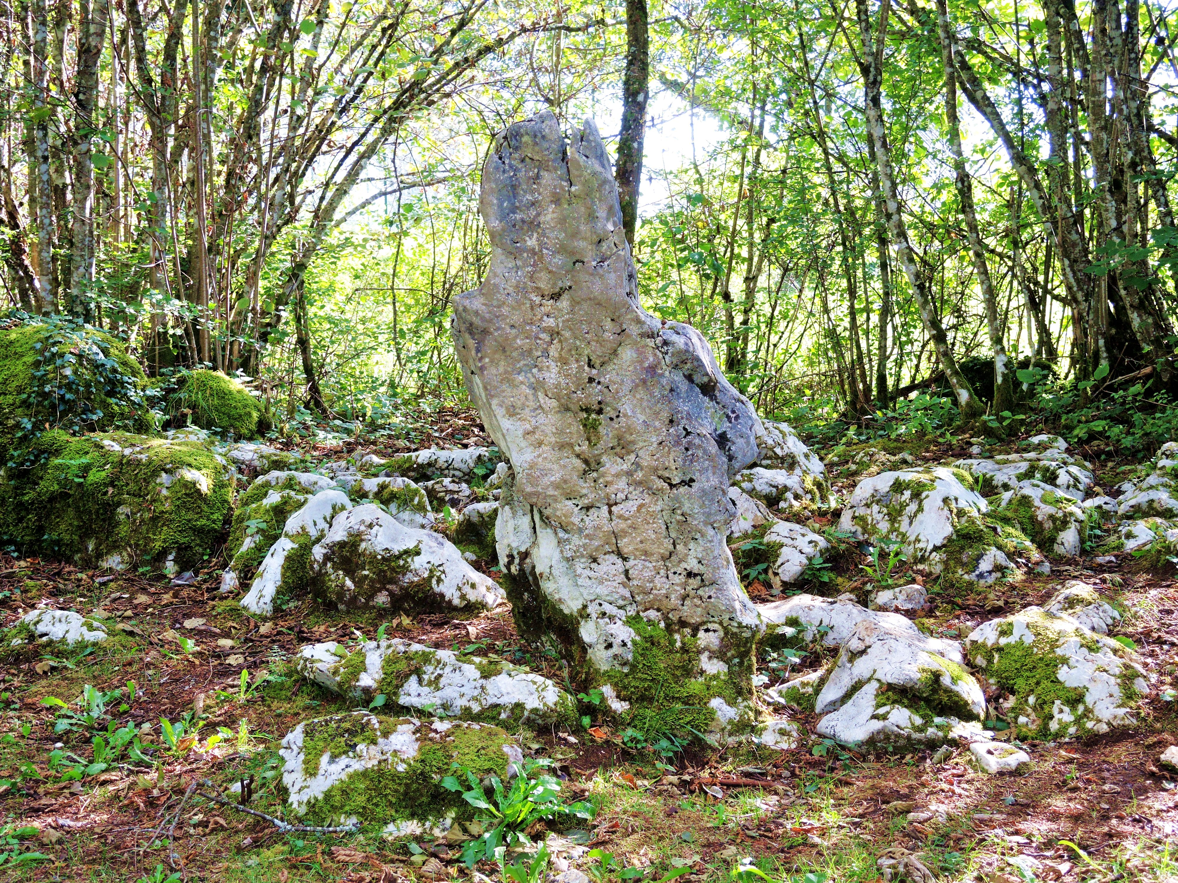 Le curieux rocher-menhir, nommé déesse Alésia